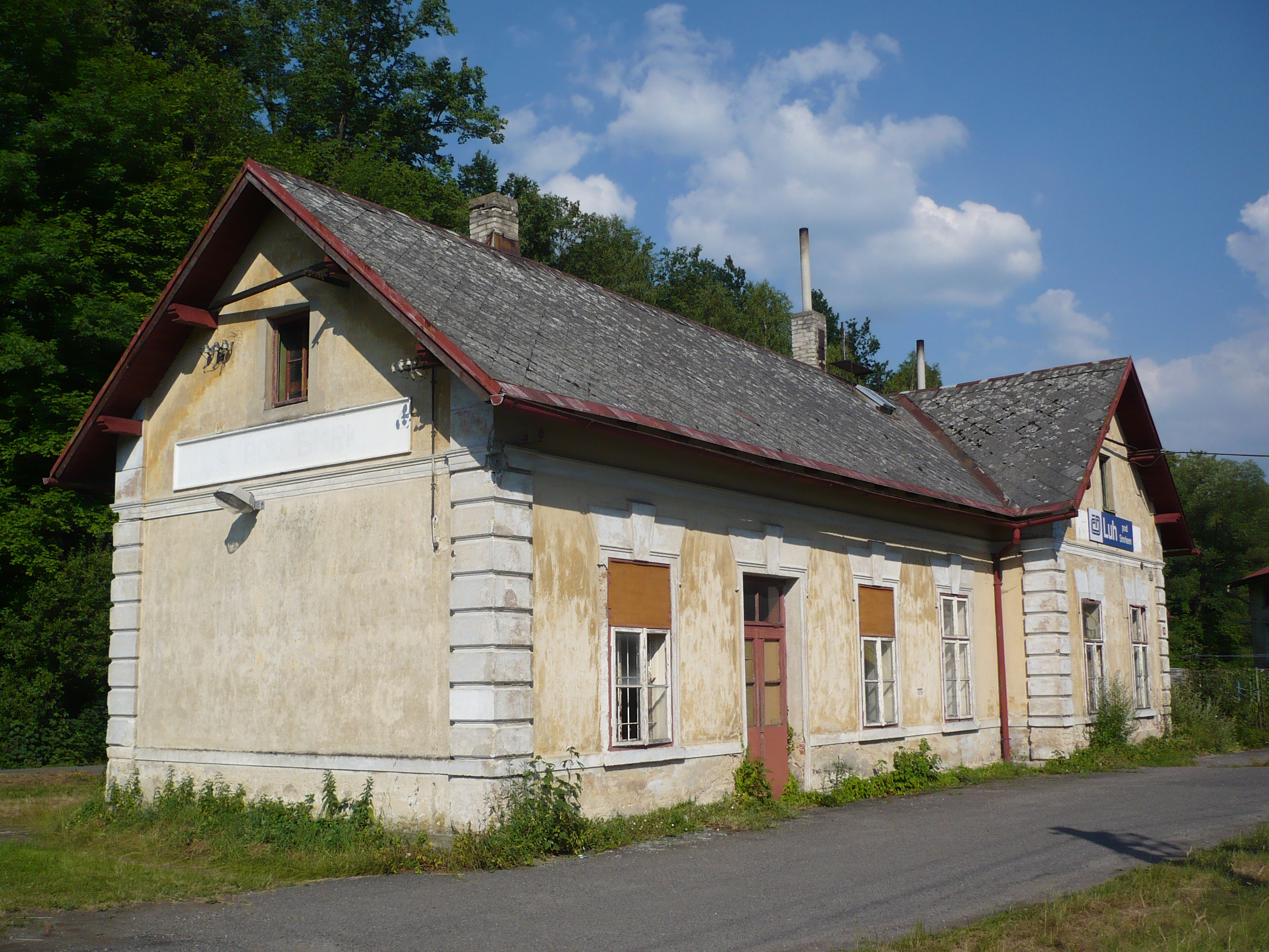 Zastávka Luh pod Smrkem. Vlastníkem budovy je státní organizace Správa železniční dopravní cesty (č.p. 300 na parcele 1481)